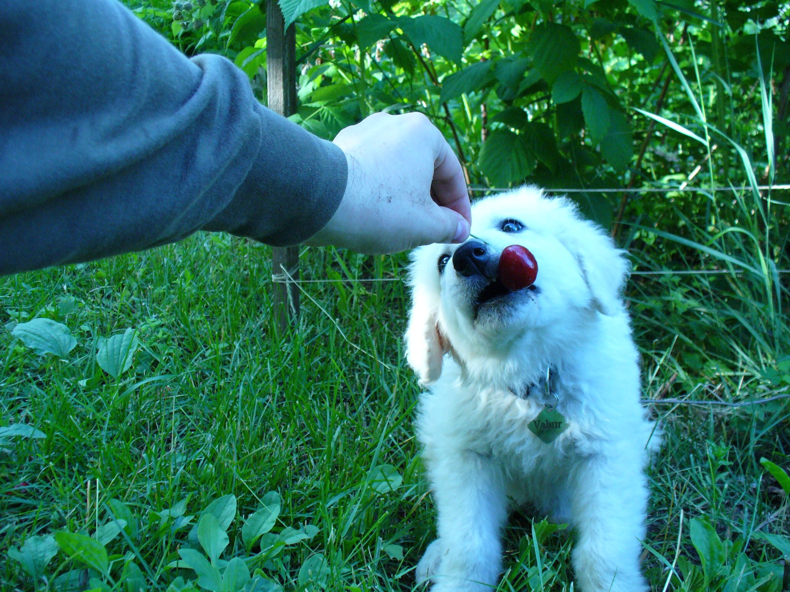 Kölyök kuvasz